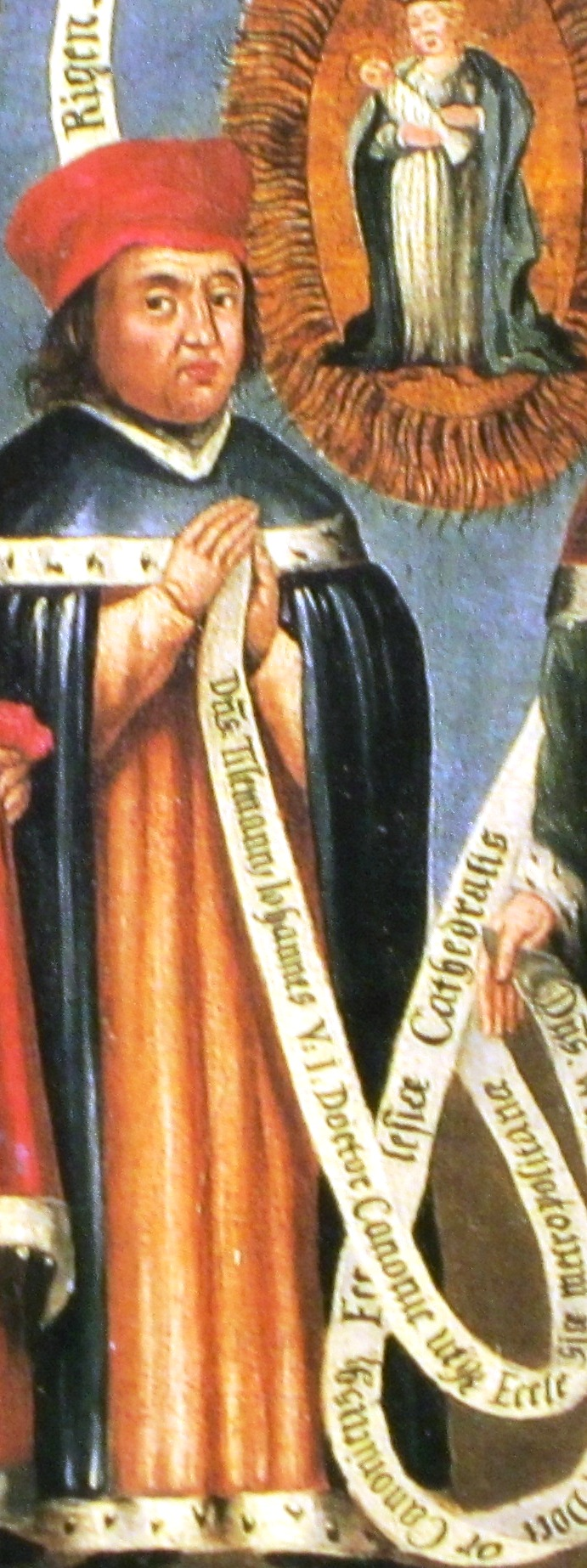 Bildnis Johannis Tidemann. Ausschnitt aus der Rubenow-Tafel in Greifswald.